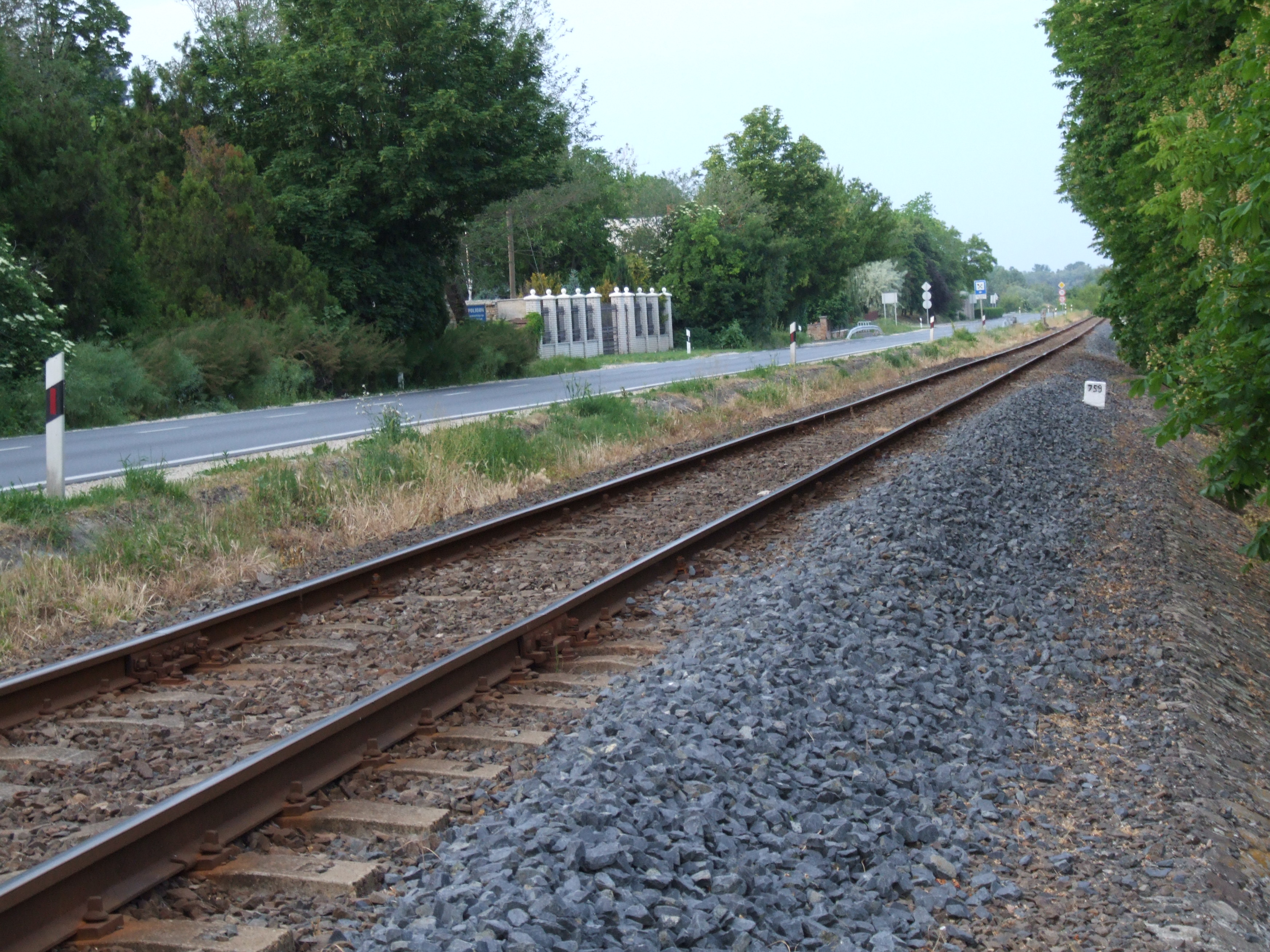 A vasút és a 6-os út Paks mellett